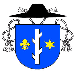 Erb kyjovského děkanátu, arcidiecéze olomoucká